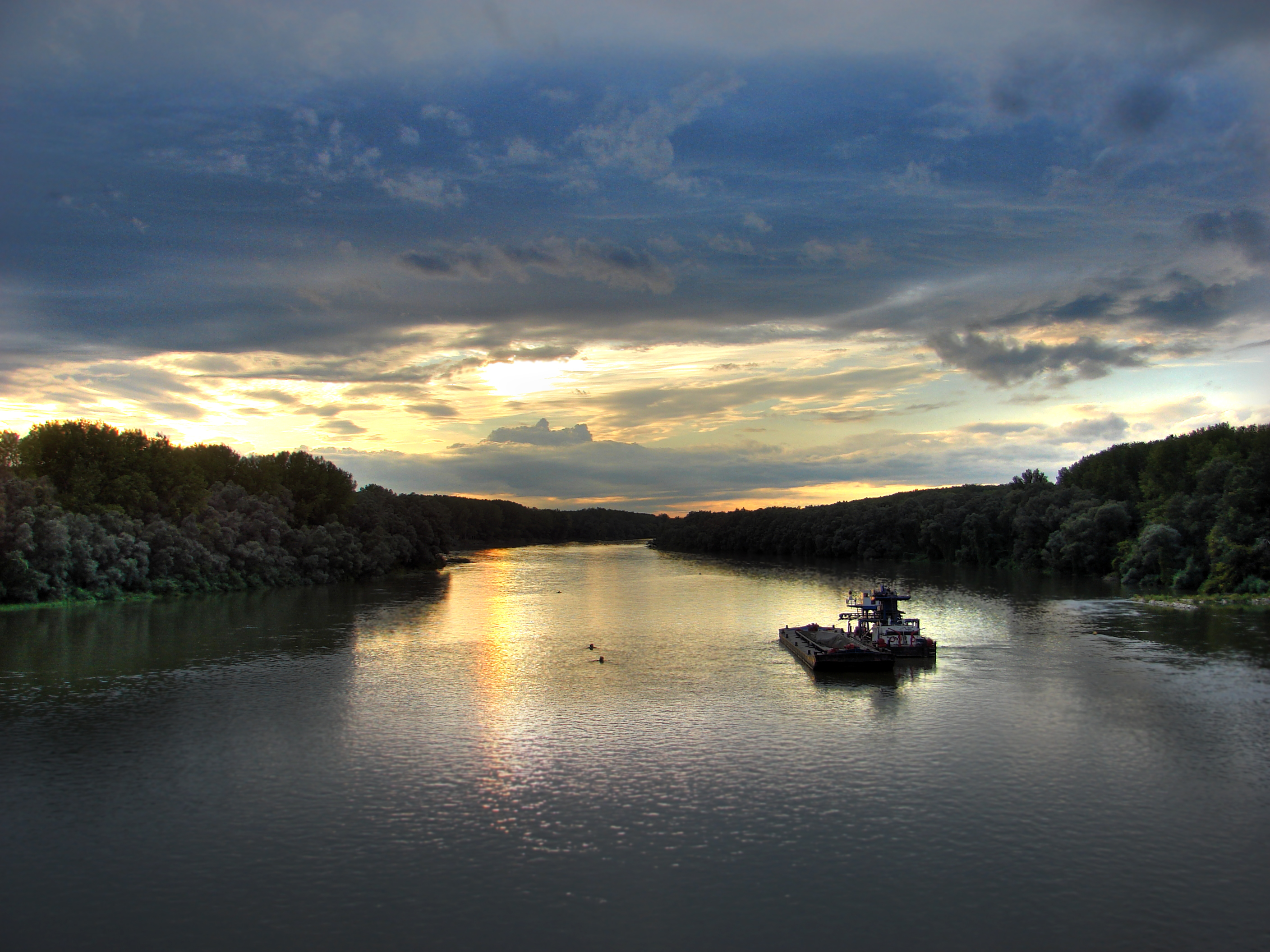 Drava kod ušća rijeke Karašice